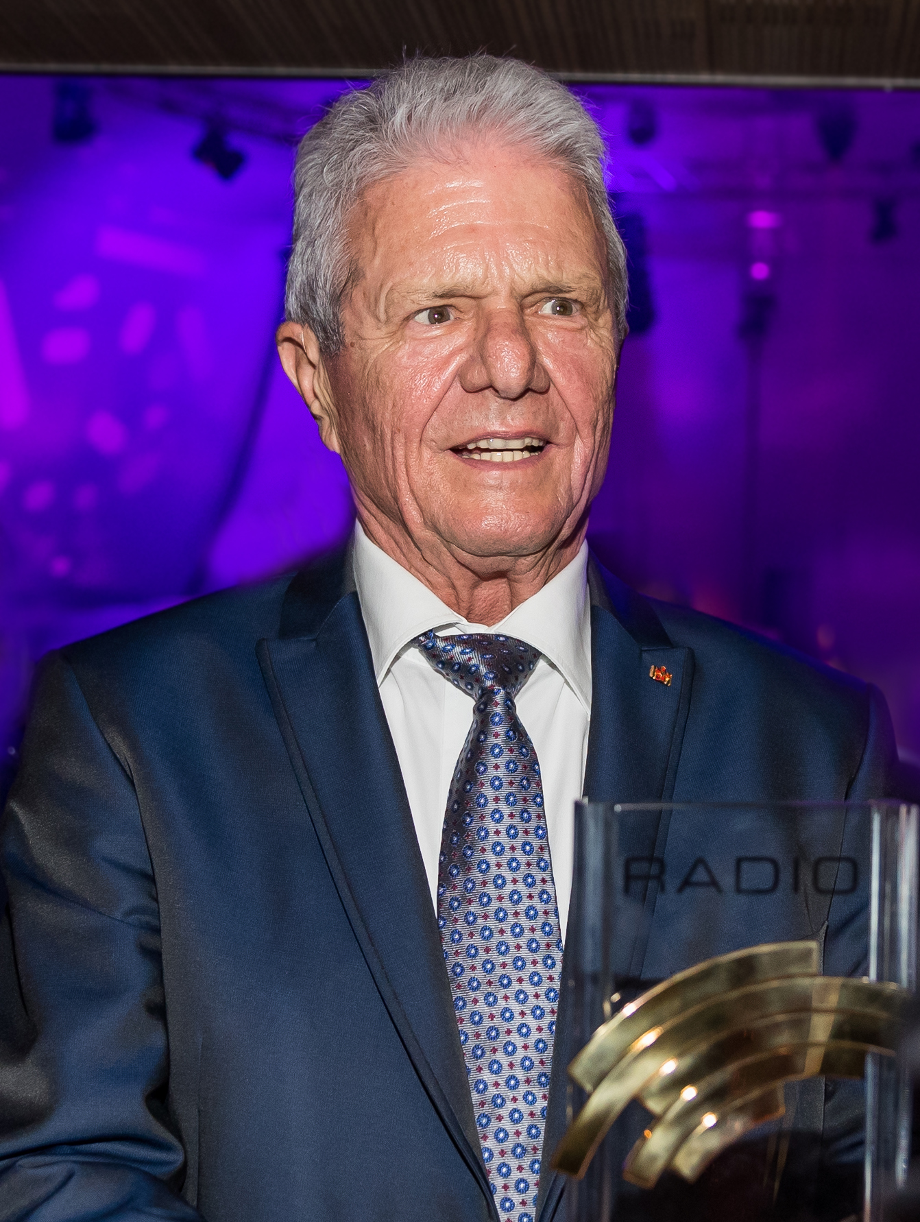 Dietmar Hopp in 2019 during Radio Regenbogen Award 2019 at Europapark, Rust, Baden-Württemberg, Germany on 2019-04-12, Photo: Sven Mandel